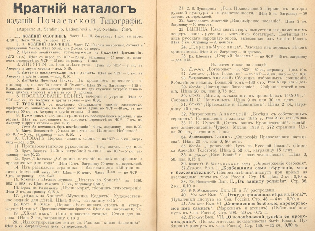 Реклмное объявление о печатной продукции Типографского братства пр. Иова во Владимировой в Календаре 1939 г.